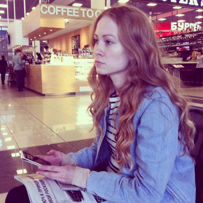 Российская легкоатлетка Елизавета Гречишникова